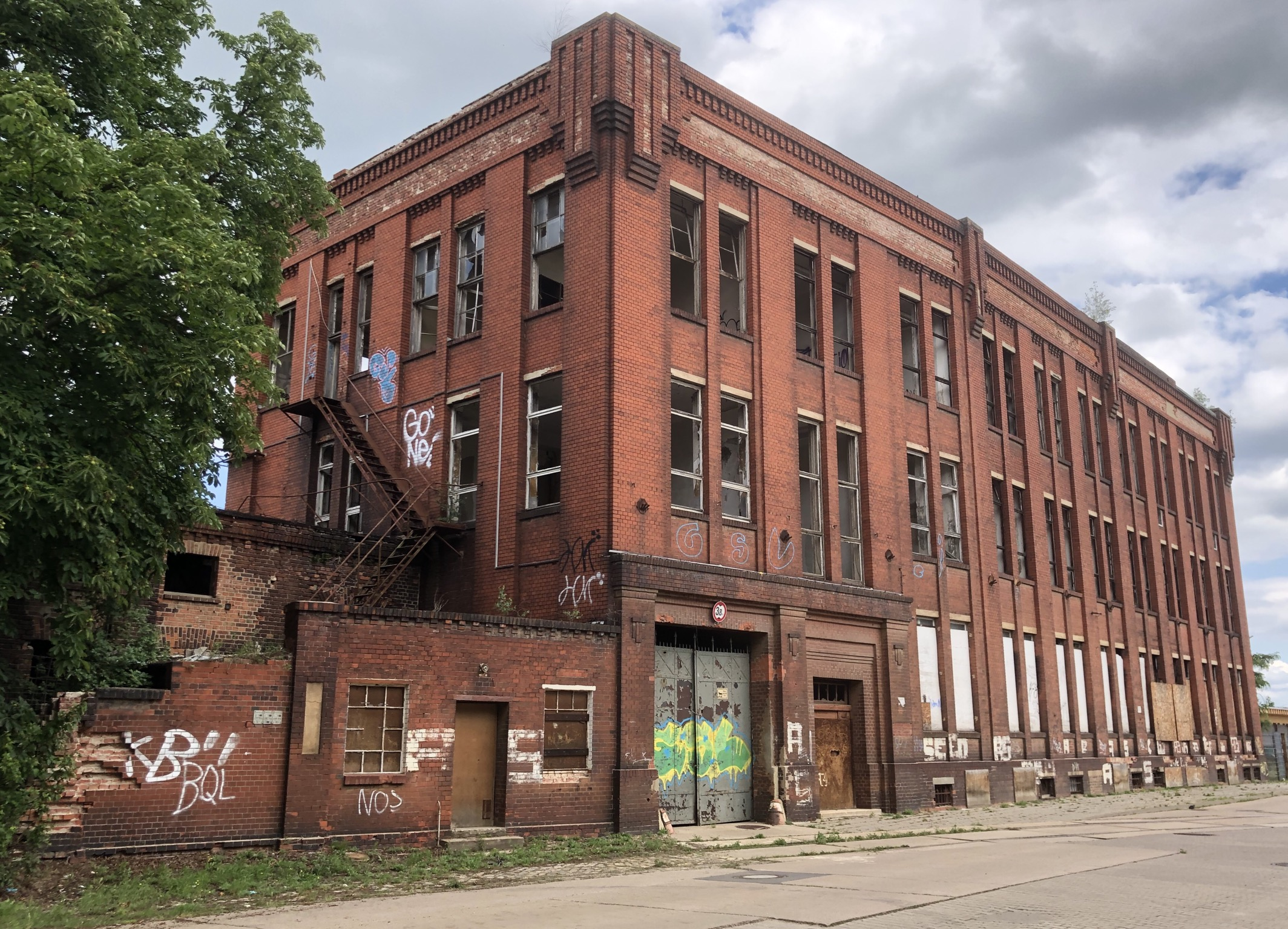 PROWIKO Paulstraße in Schönebeck